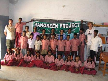 Aufnahme aus Indien - Pattukkottai. Links steht Herbert Hofmann/Redakteur, rechts Dr. Onno Groß und der OMCAR Chef Balaji.